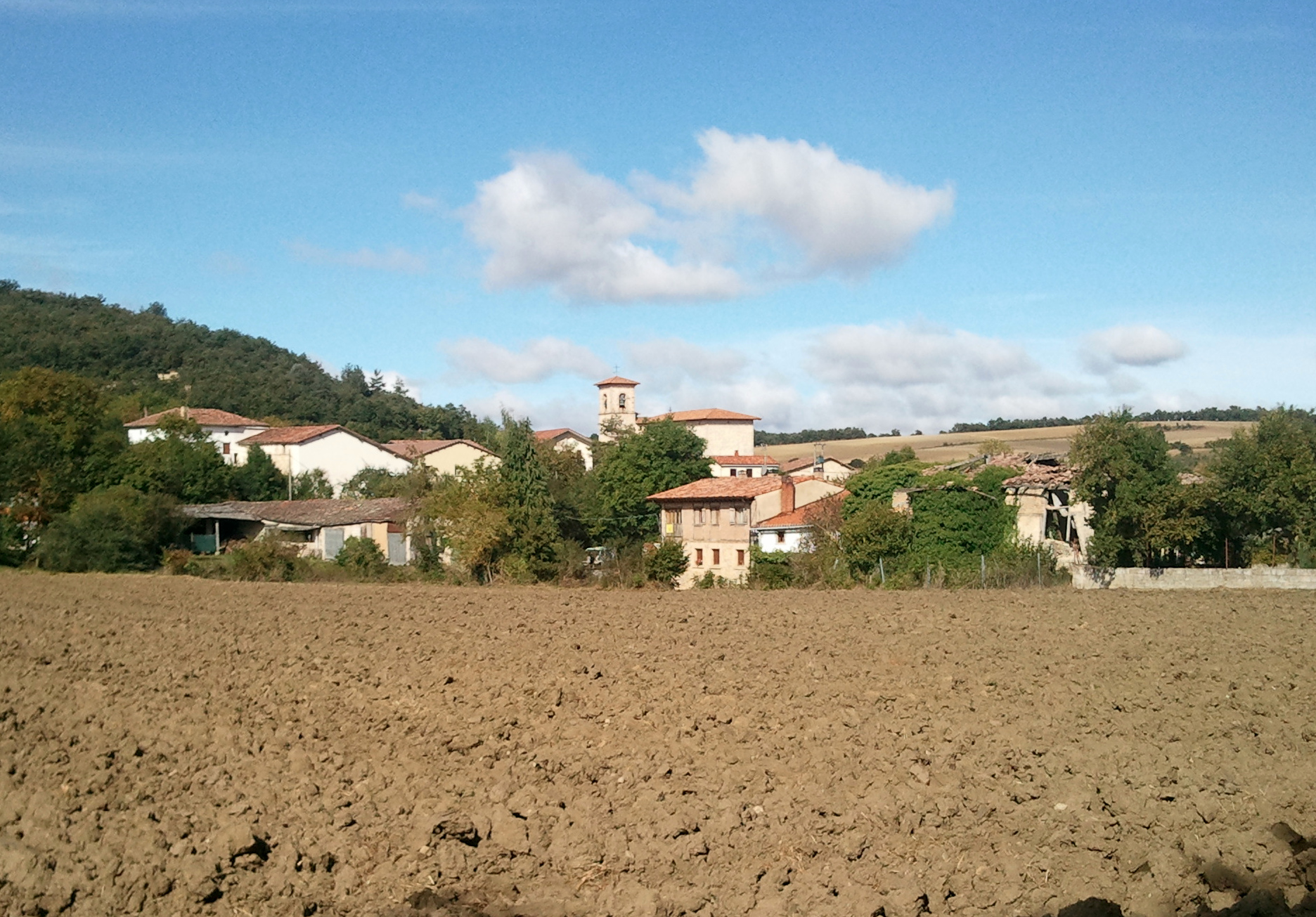 Gamiz (Gasteiz)